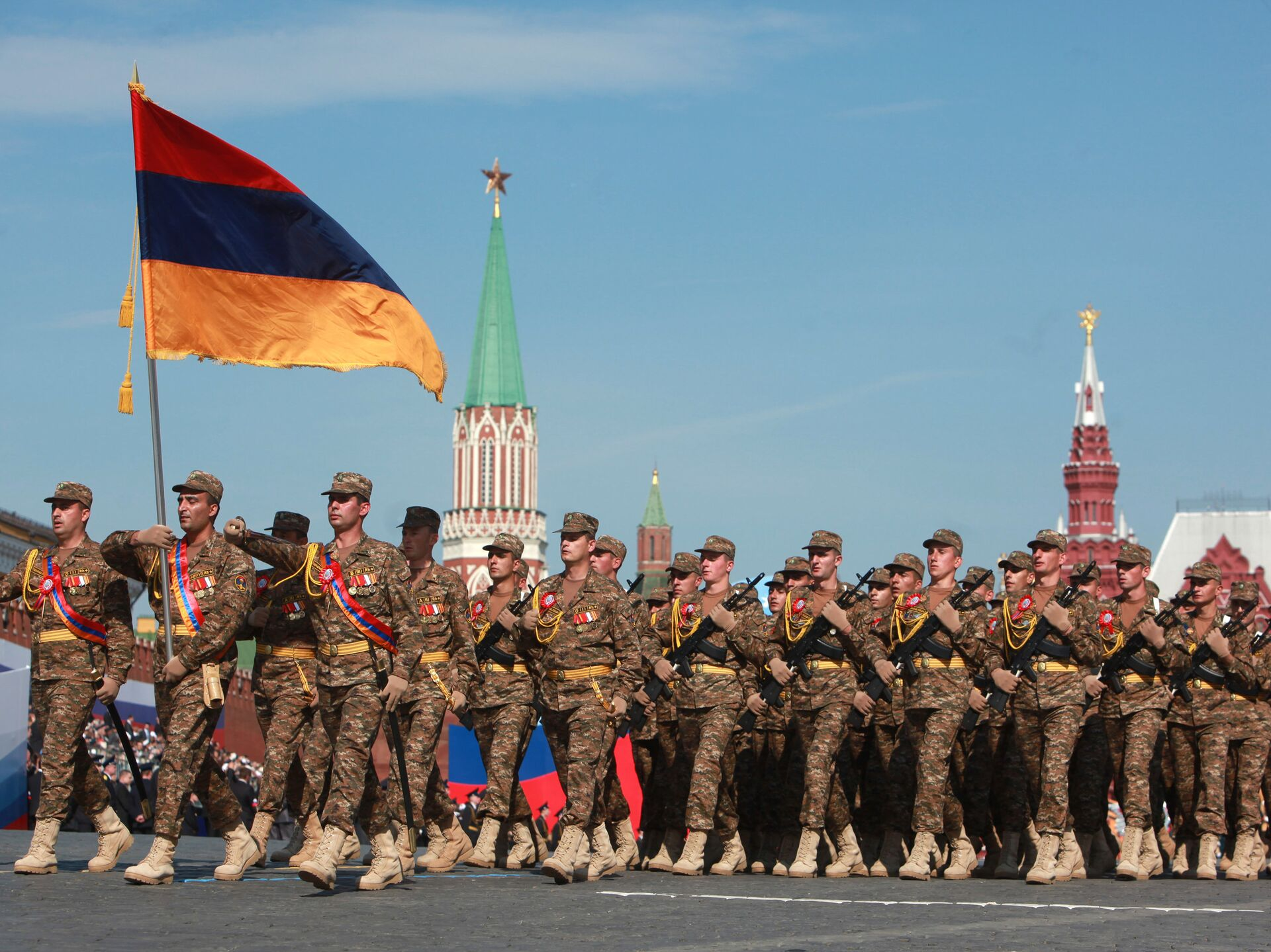 Военный парад, посвящённый 65-летию Победы в Великой Отечественной войне.